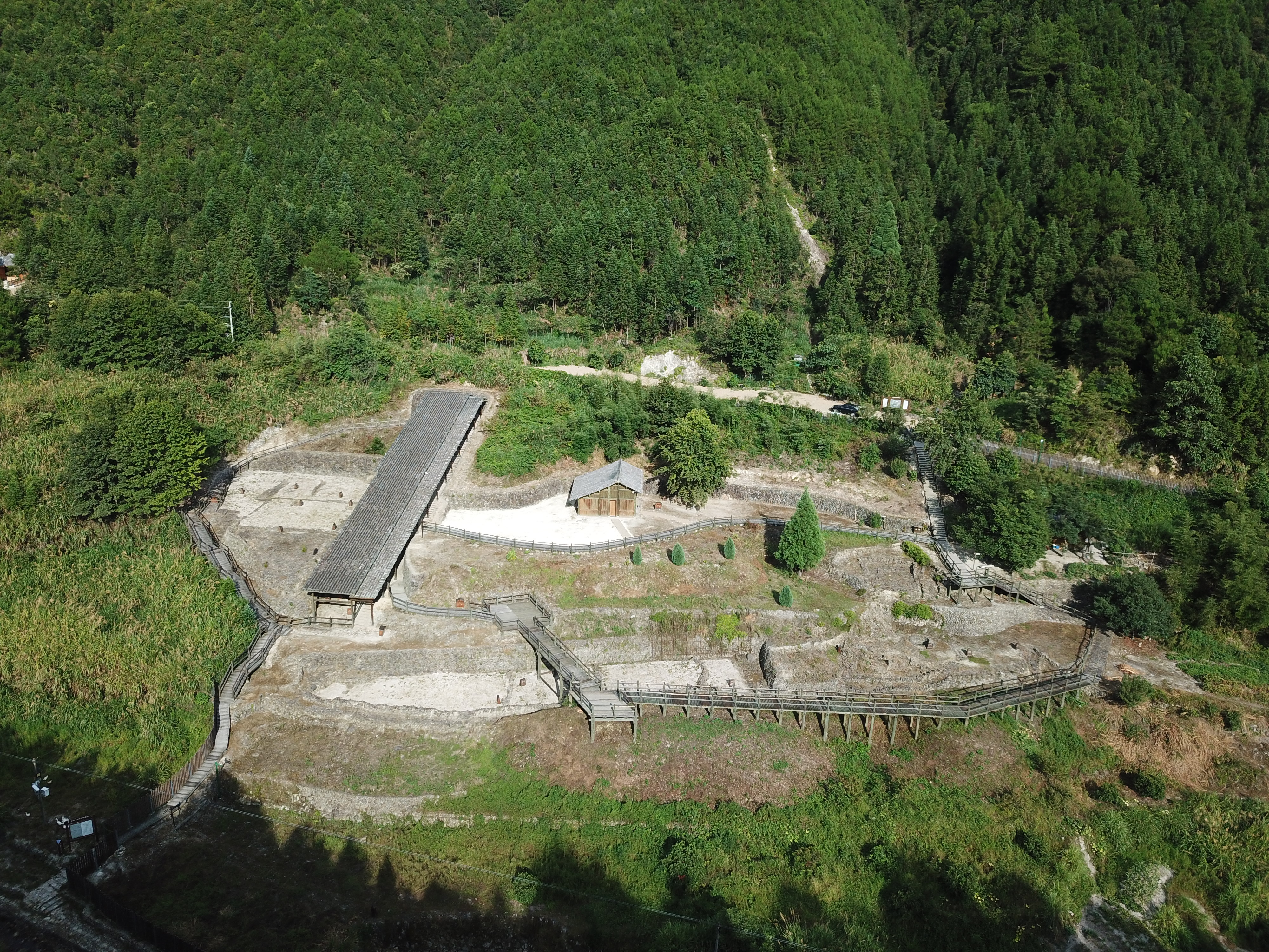 龙泉·大窑枫洞岩窑址